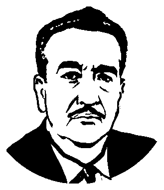 Халед Багдаш